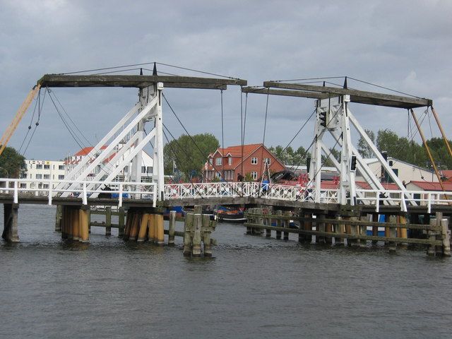 Wieck bei Greifswald (Wieck near Greifswald (Baltic))